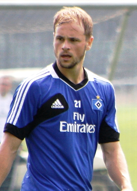 Maxi Beister beim HSV-Training am 25. Juli 2013.